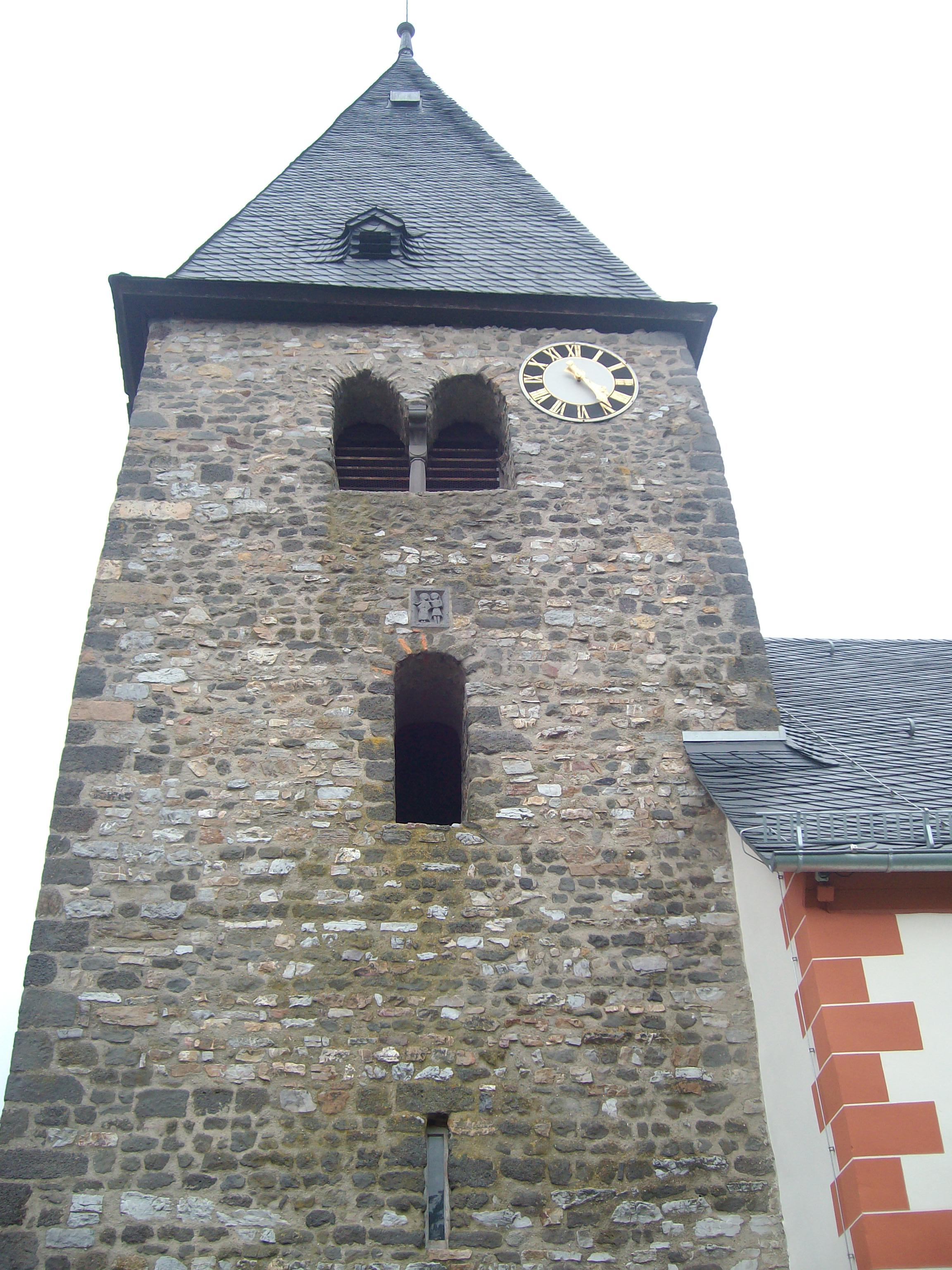 Kirchturm der Evangelischen Kirche in Kirch-Göns, Hessen